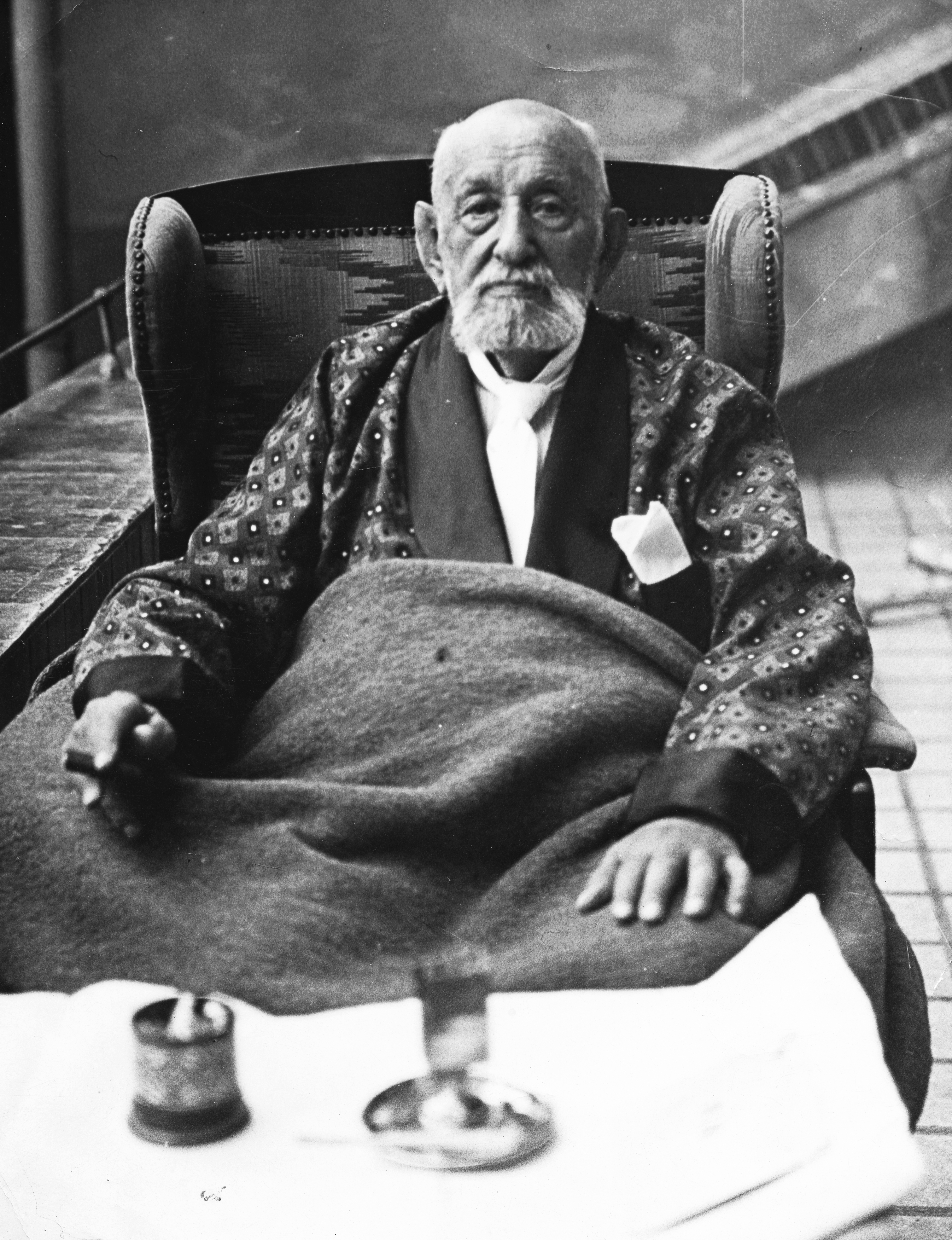 Popper István a Telefonhírmondó Rt. alapítója, egykori tulajdonosa.